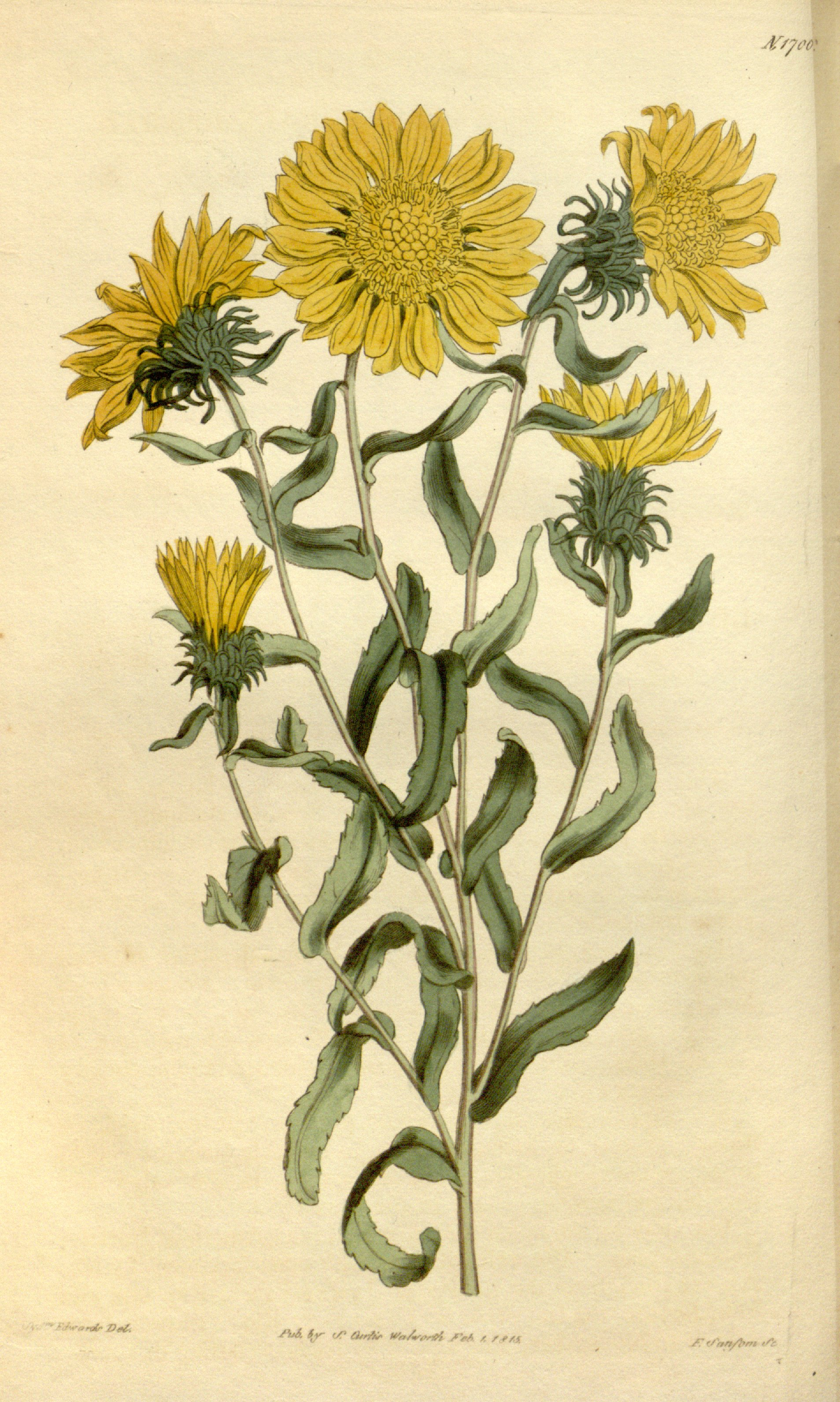 Legende: Oberer Teil der Pflanze.